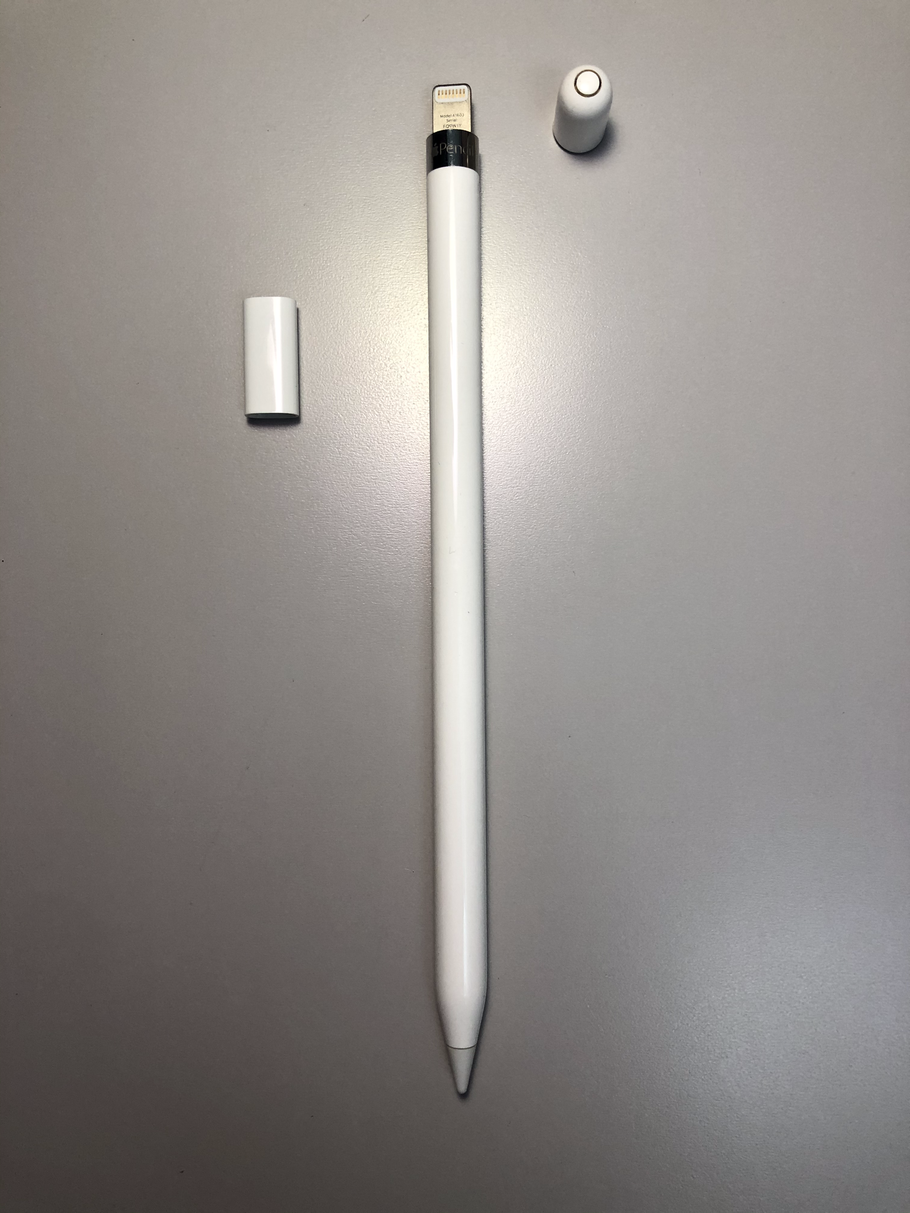 Apple Pencil avec ses accessoires.